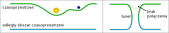 Porównanie tunelu czasoprzestrzennego do normalnej przestrzeni